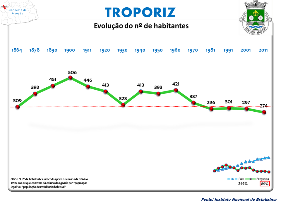 Censos 1864/2011